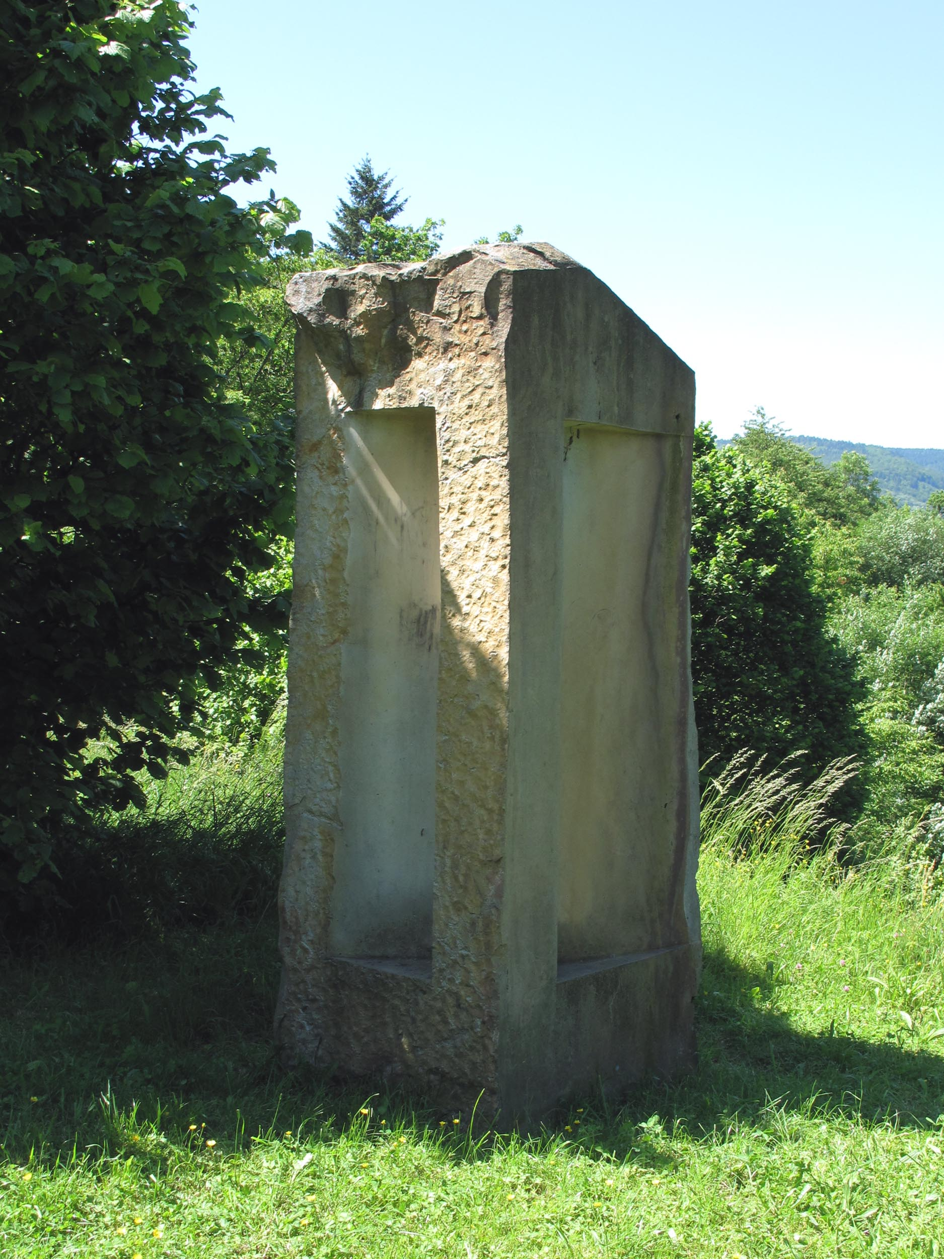 Susanne Specht, Tempel, 1996, - Deutschland, Baden-Württemberg, Skulpturenpark Heidelberg